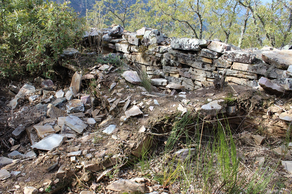 Interior y resto de la muralla al fondo del Castro de peña del Hombre en Paradela de Muces